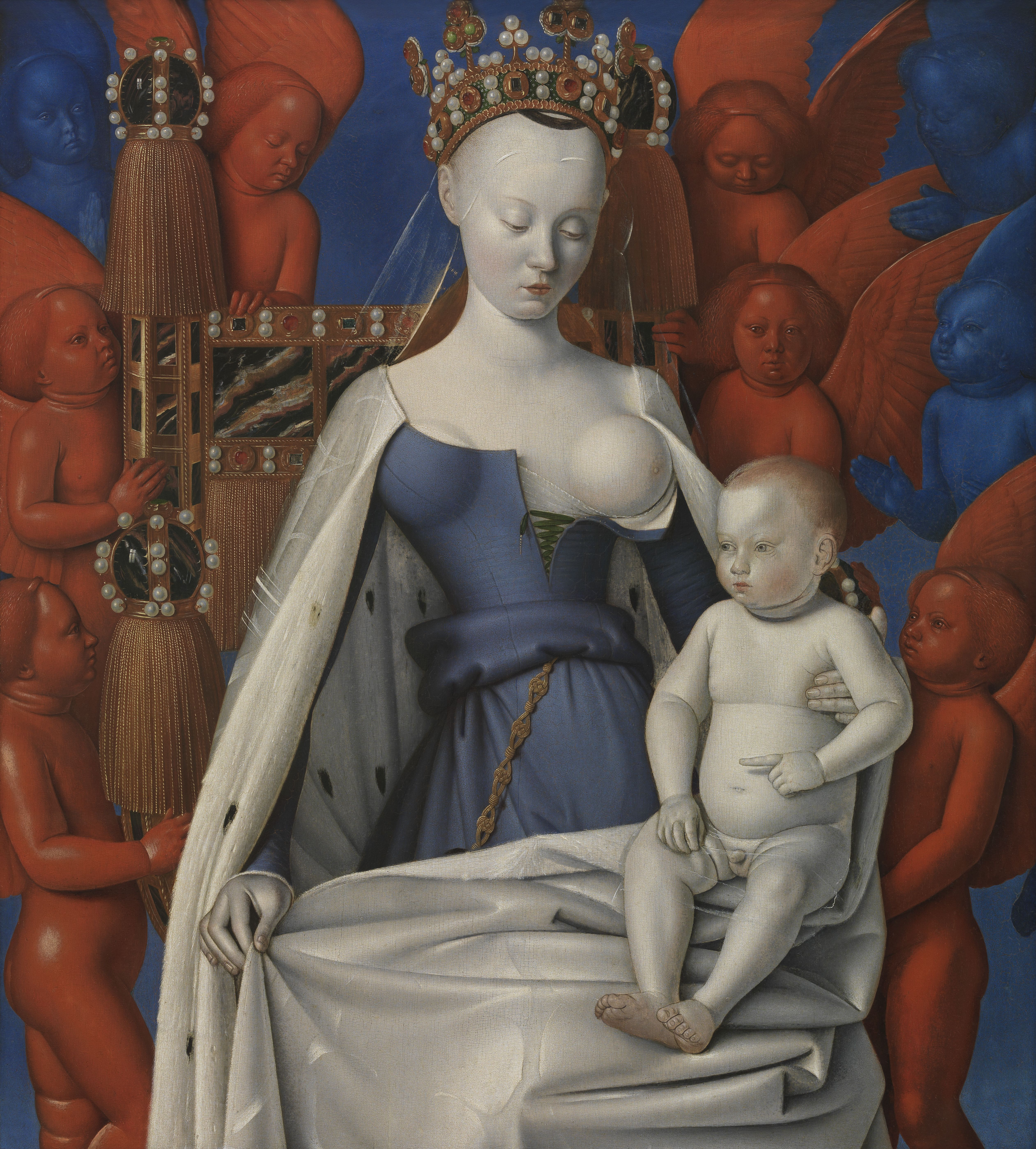 schilderij ( Jean Fouquet( koninklijk museum voor schone kunsten antwerpen